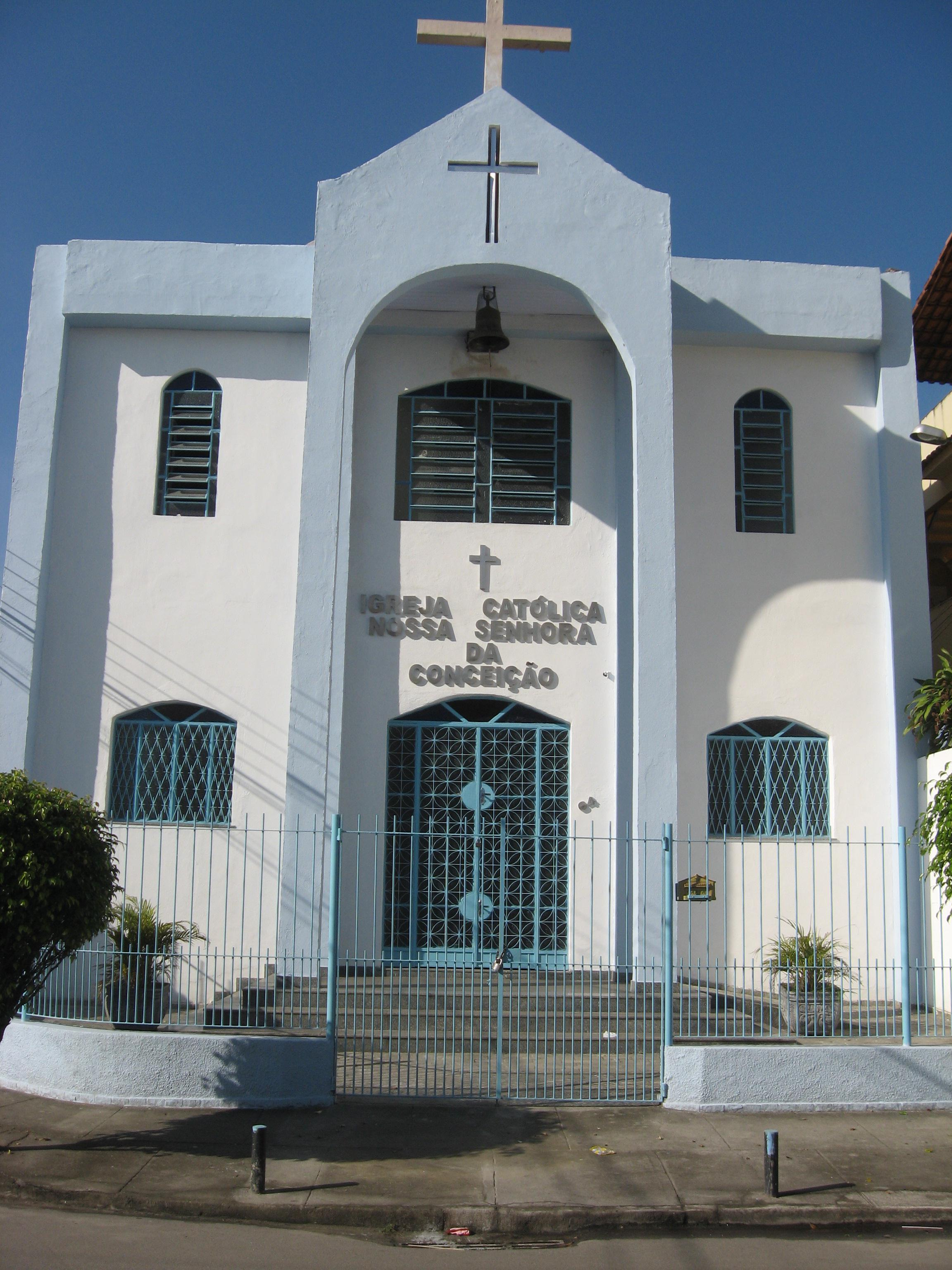 Igreja em Pres. Juscelino, Mesquita, RJ